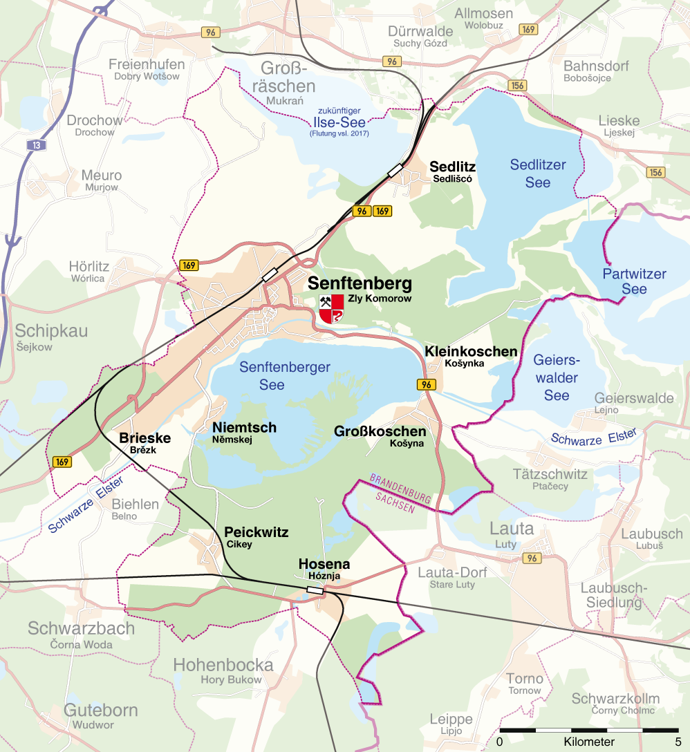 Karte von Senftenberg